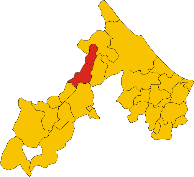 Mappa del comune di Poggio Torriana (provincia di Rimini, regione Emilia-Romagna, Italia)